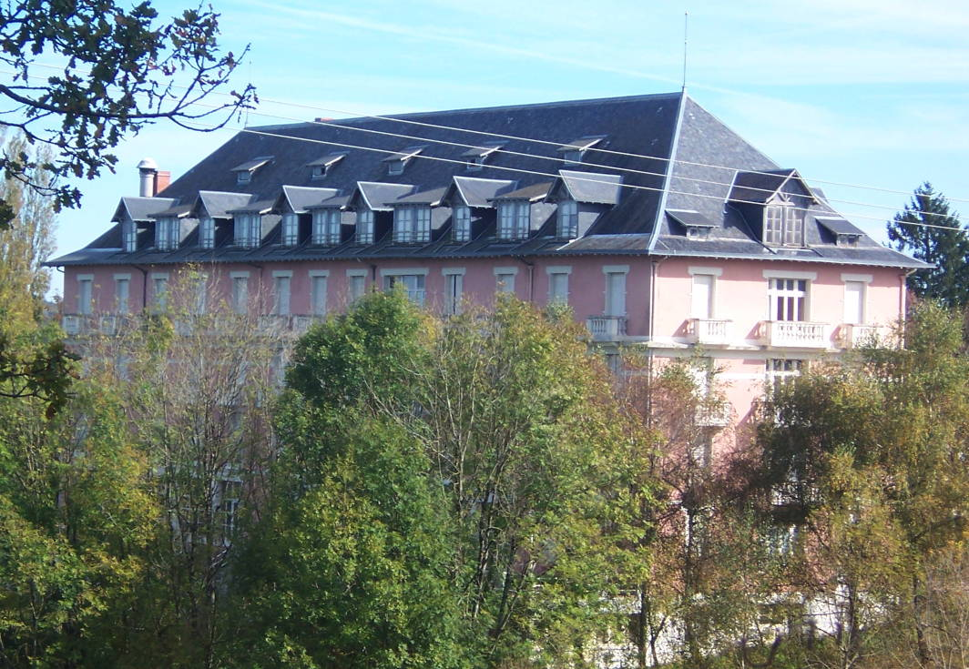 L'hotel des sources d'Alvignac où séjournaient les curistes.